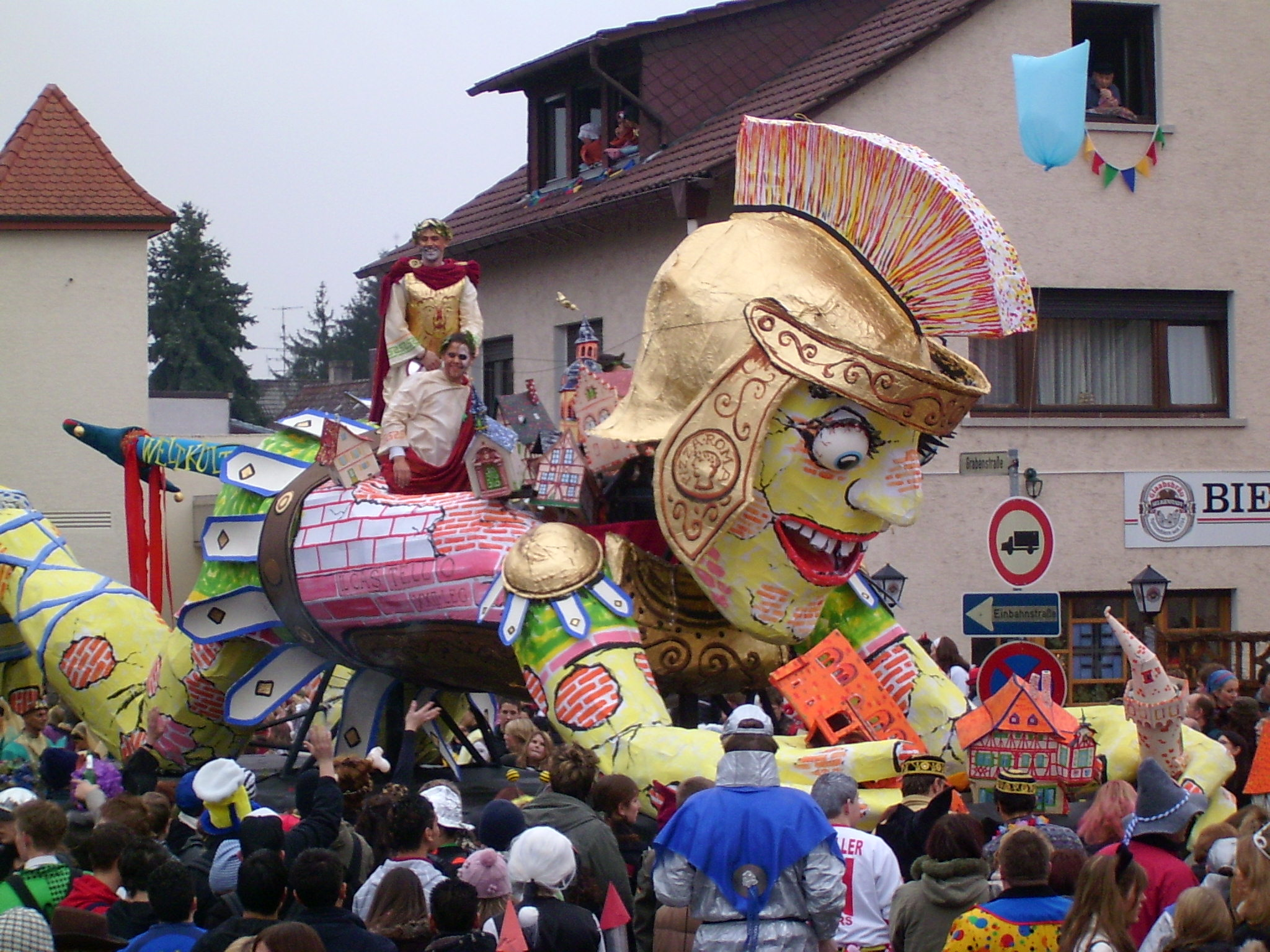 Motivwagen der Seligenstädter Fastnacht / float (in a parade) by Seligenstaedter Fastnacht